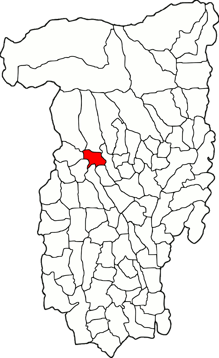 Lage der Gemeinde Măldărești im Kreis Vâlcea (RO).